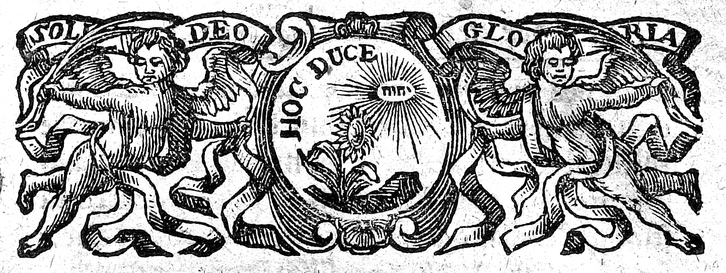 Typischer Buchschmuck in Drucken von Johann Michael Funcke mit dem Spruchband SOLI DEO GLORIA